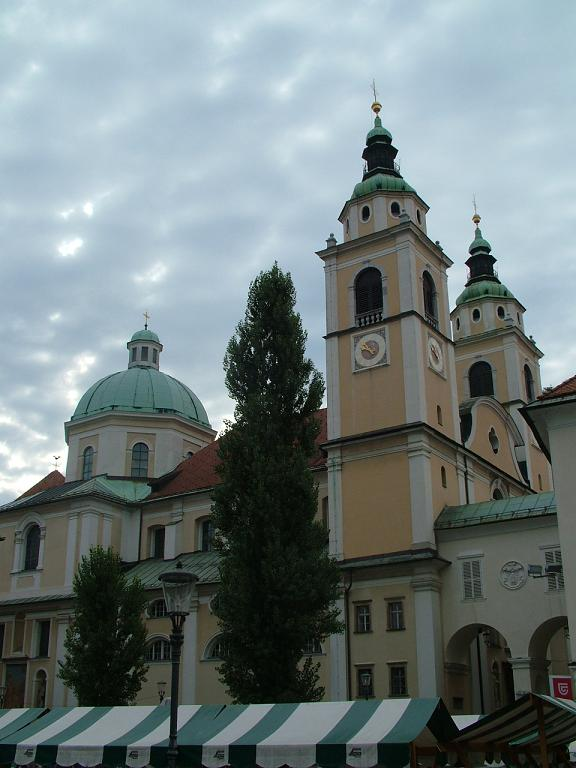 Dom von Ljubljana